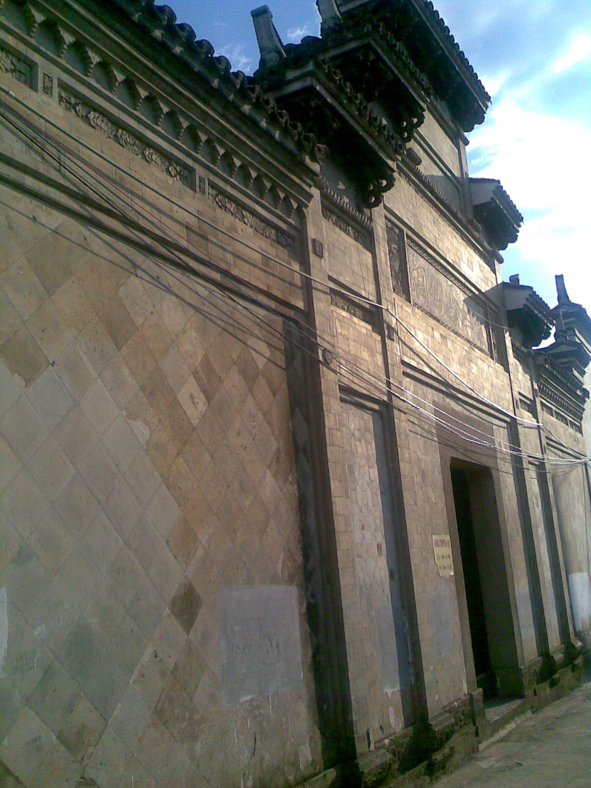 浙江省永康市徐震二公祠